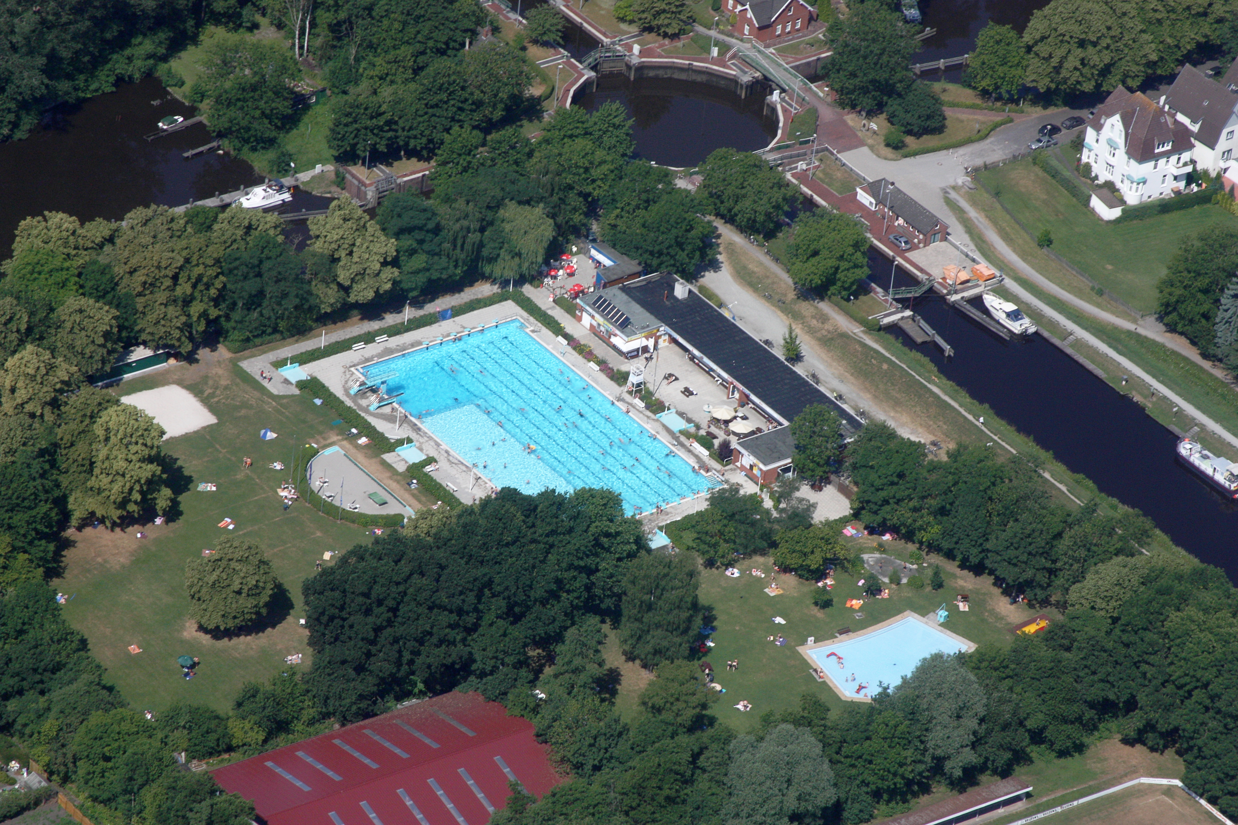 Flug über Emden; Flughöhe 1500 ft; Juli 2010; Originalfoto bearbeitet: Tonwertkorrektur und Bild geschärft mit Hochpassfilter